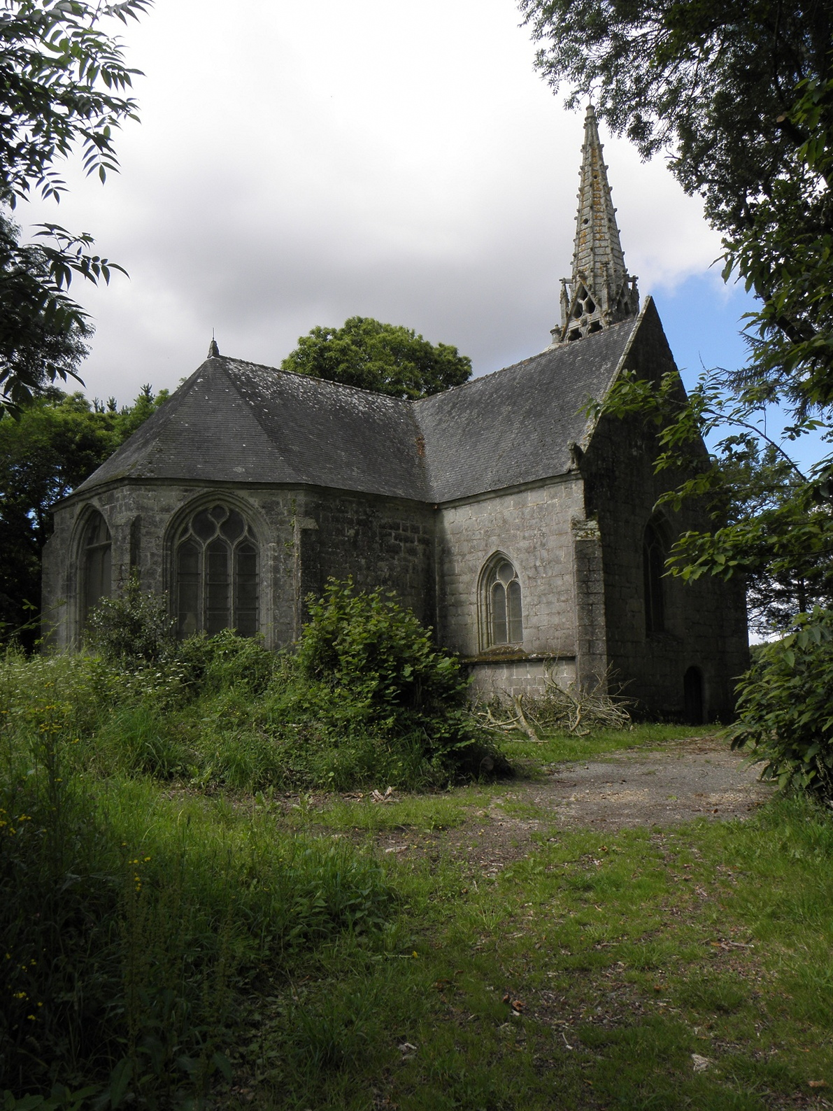 Chapelle de La Véronique à Bannalec (29). Chevet.